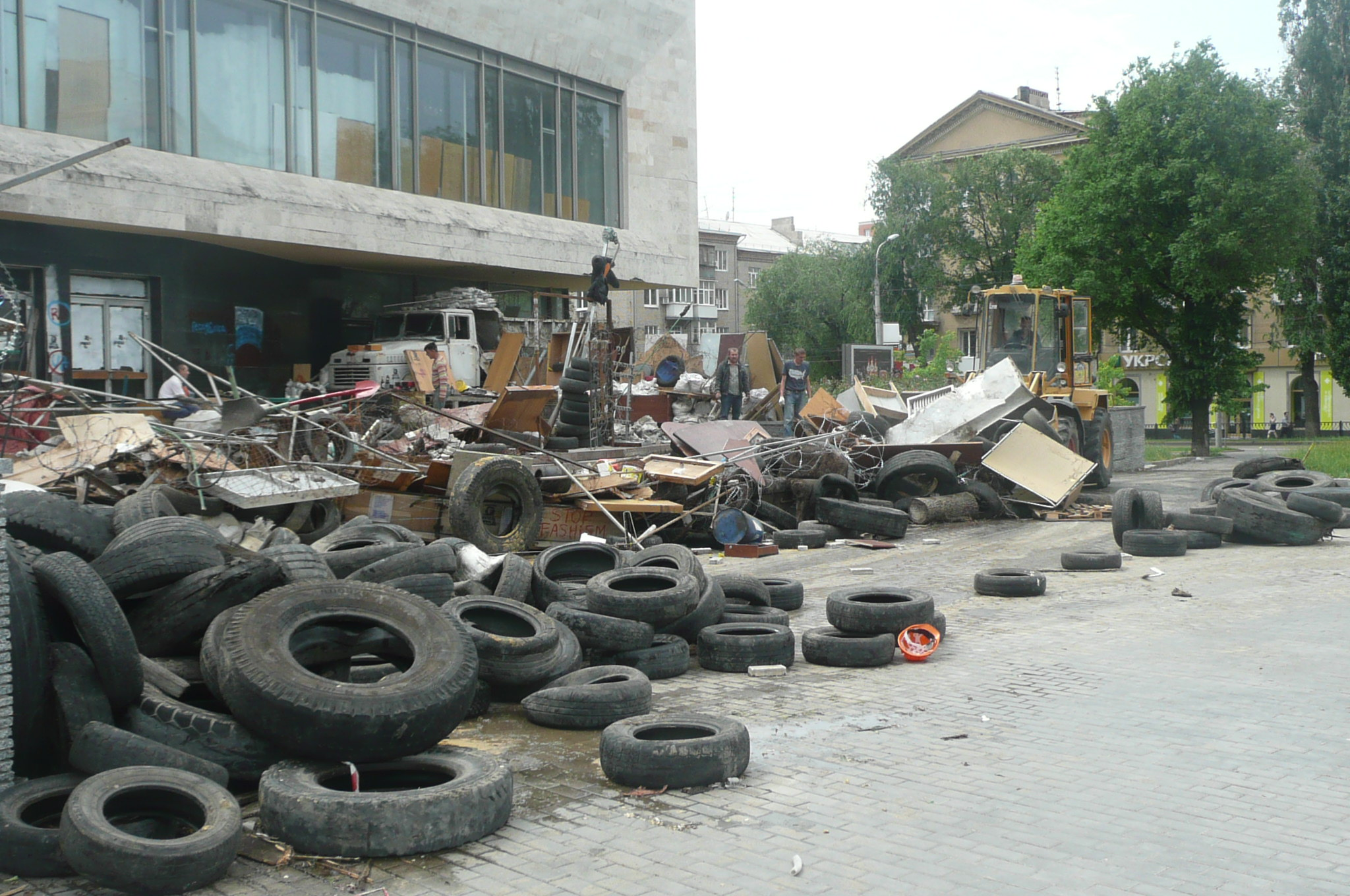 Протесты в Донецке